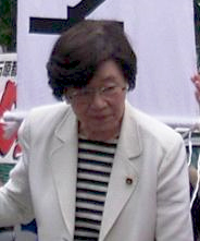 東京都議会議員選挙の応援に訪れた土井たか子。土井たか子＠東京都議会議員選挙